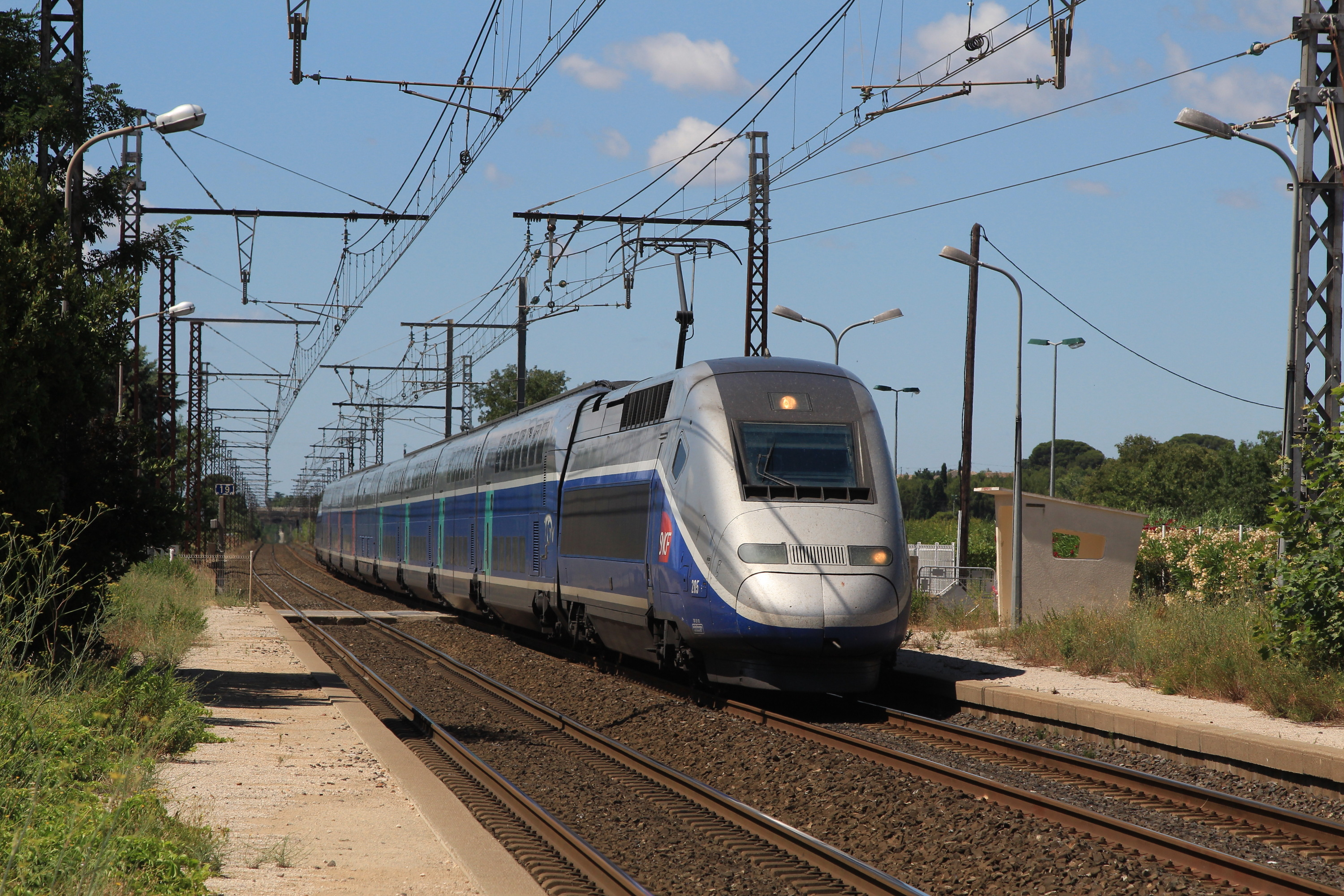 Passage sans arrêt du TGV Duplex n°285 assurant le train 5167 Perpignan - Lille en gare d'Aigues-Vives.